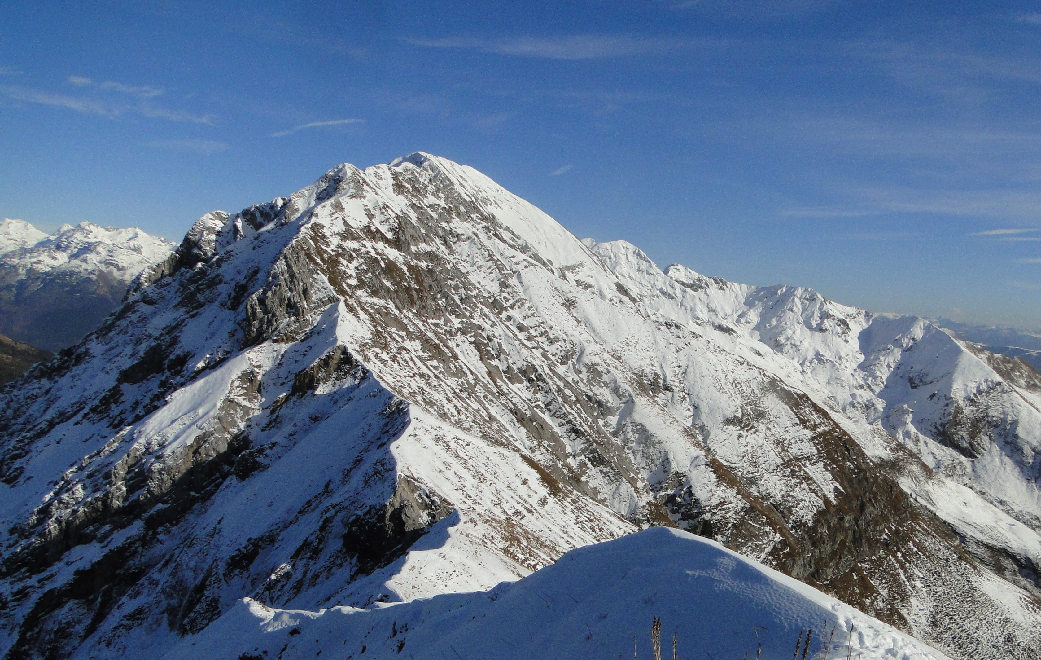 La Cima di Fop, con il passo del Re, vista dalla cima di Leten, val Seriana. Prealpi bergamasche (BG)